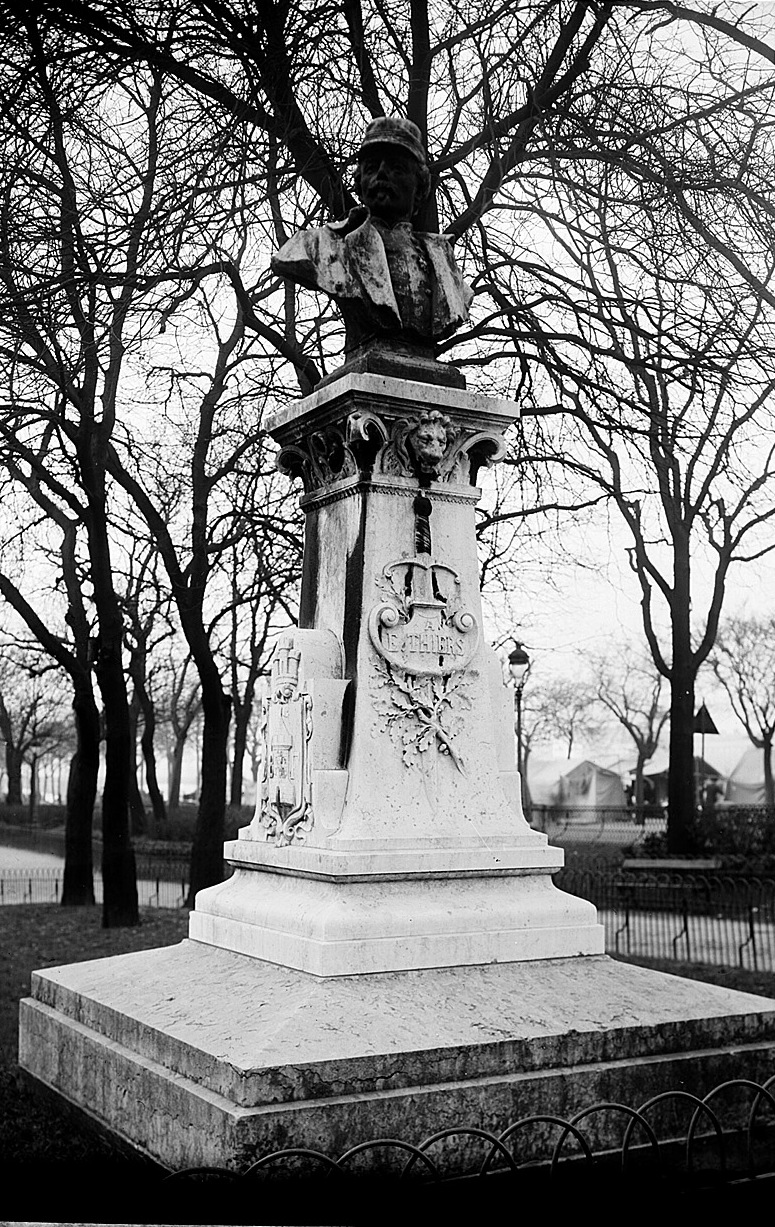 Sculpture de bronze en hommage à Édouard Thiers. Inaugurée le 29 octobre 1893, place Raspail à Lyon, elle est désignée pour être fondue en 1942. Elle est effectivement détruite par le Régime de Vichy.